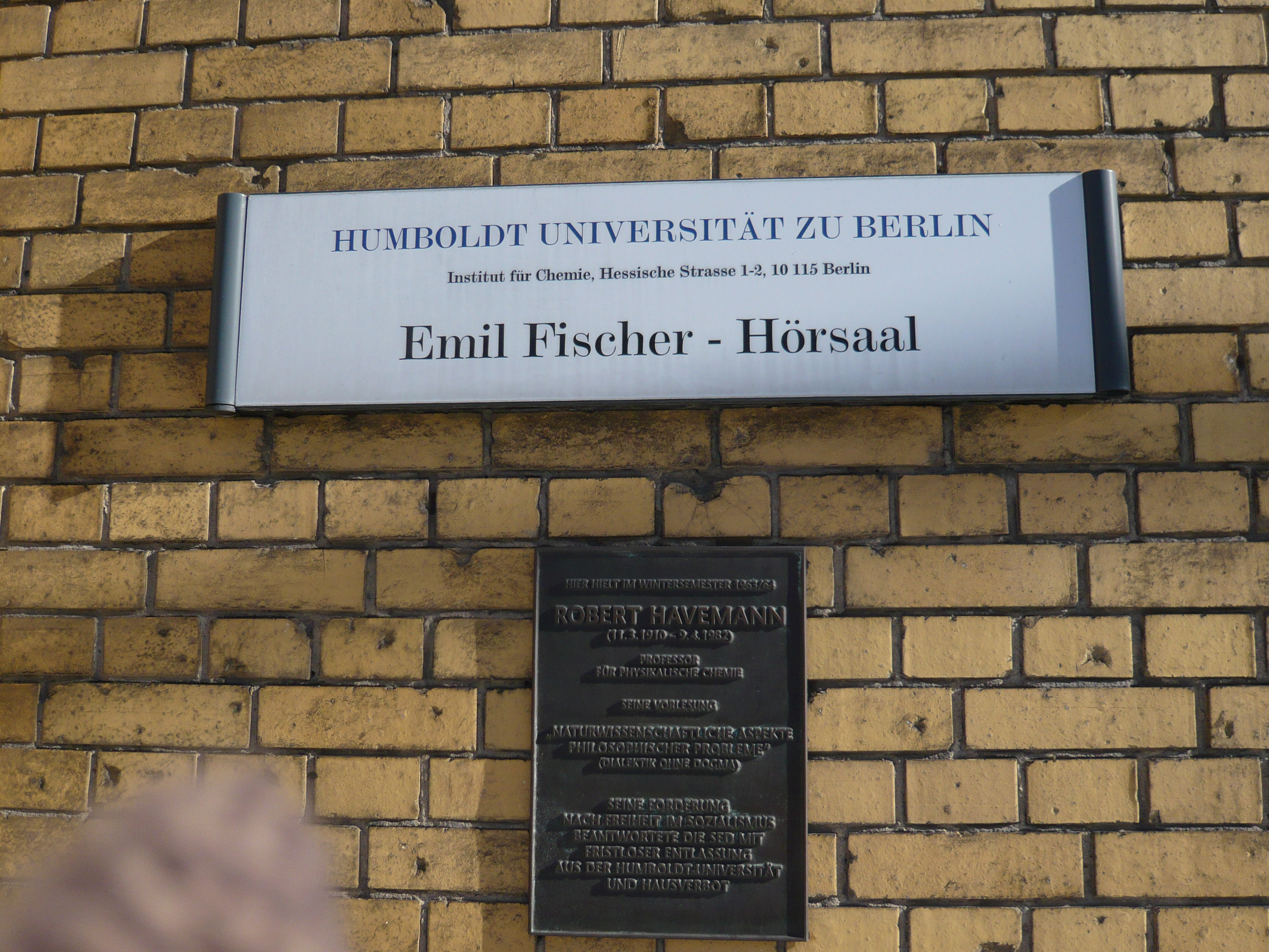 Chemisches Institut (Emil-Fischer-Hörsaal) in Berlin-Mitte